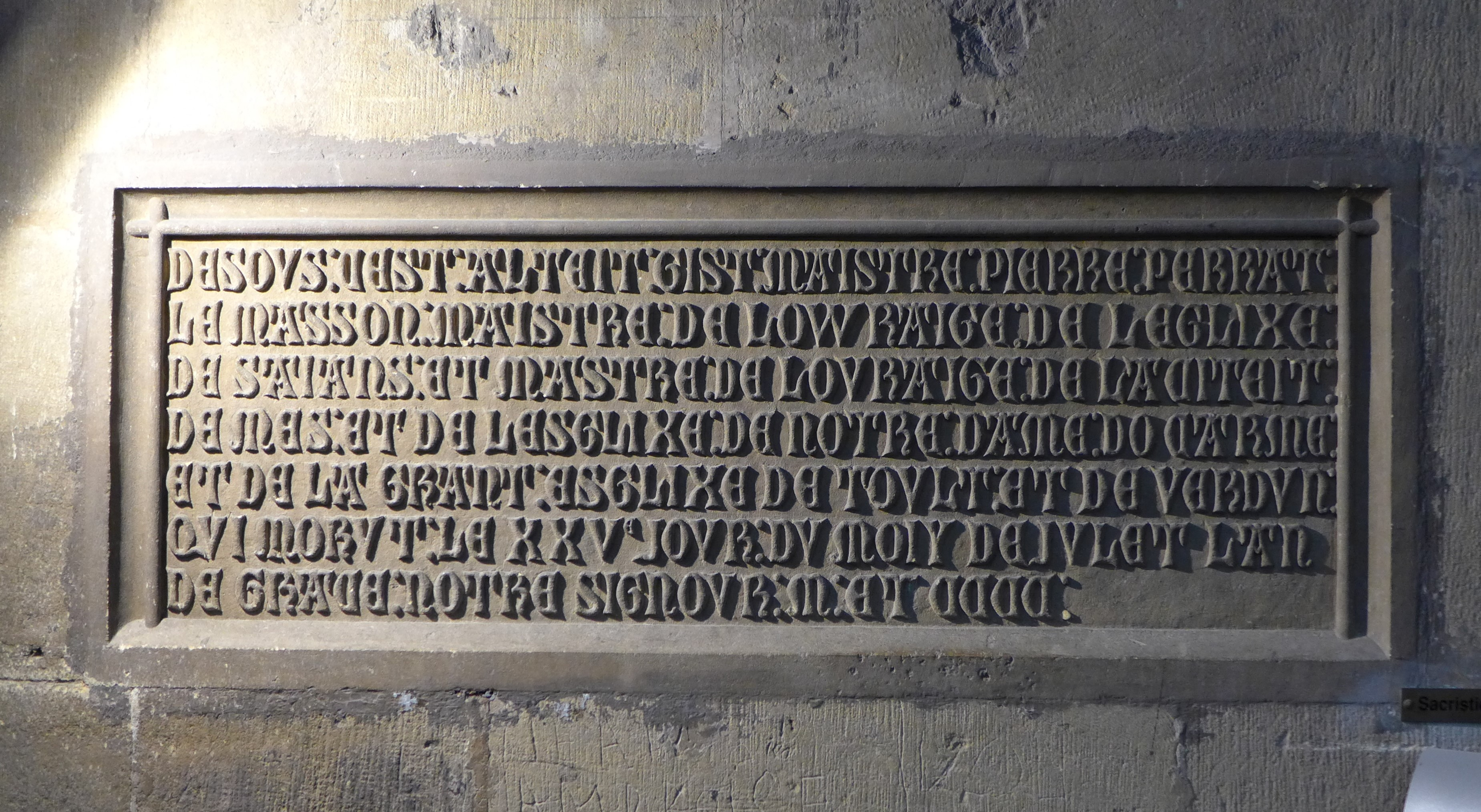 Metzer Dom, Grabplatte des Dombaumeisters Pierre Perrat